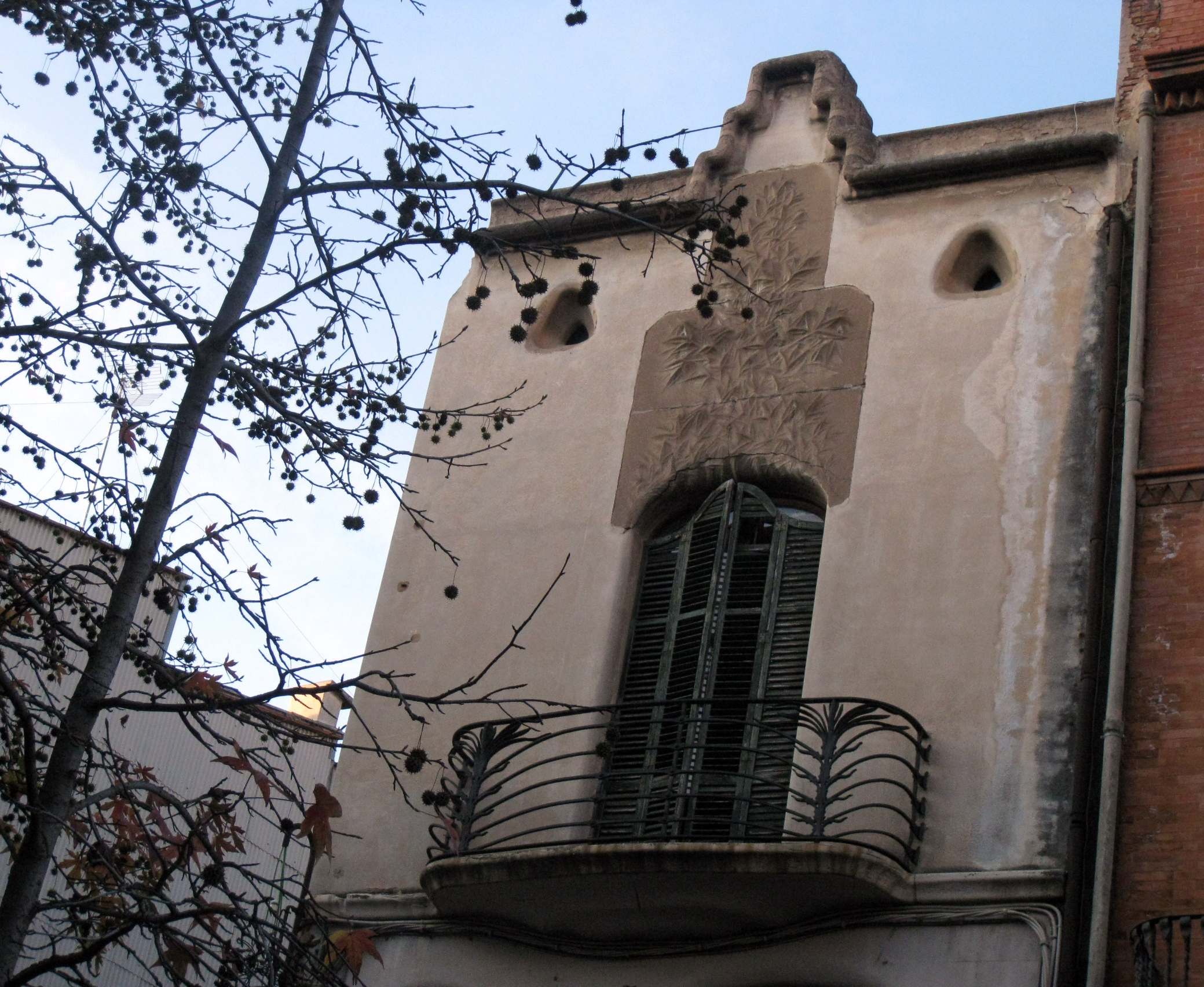 Casa Concepció Monset, al carrer de la Font Vella núm. 91 (Terrassa). Edifici modernista de Lluís Muncunill del 1907. Detall de la part alta de la casa, amb el balcó i el relleu escultòric de motiu vegetal.